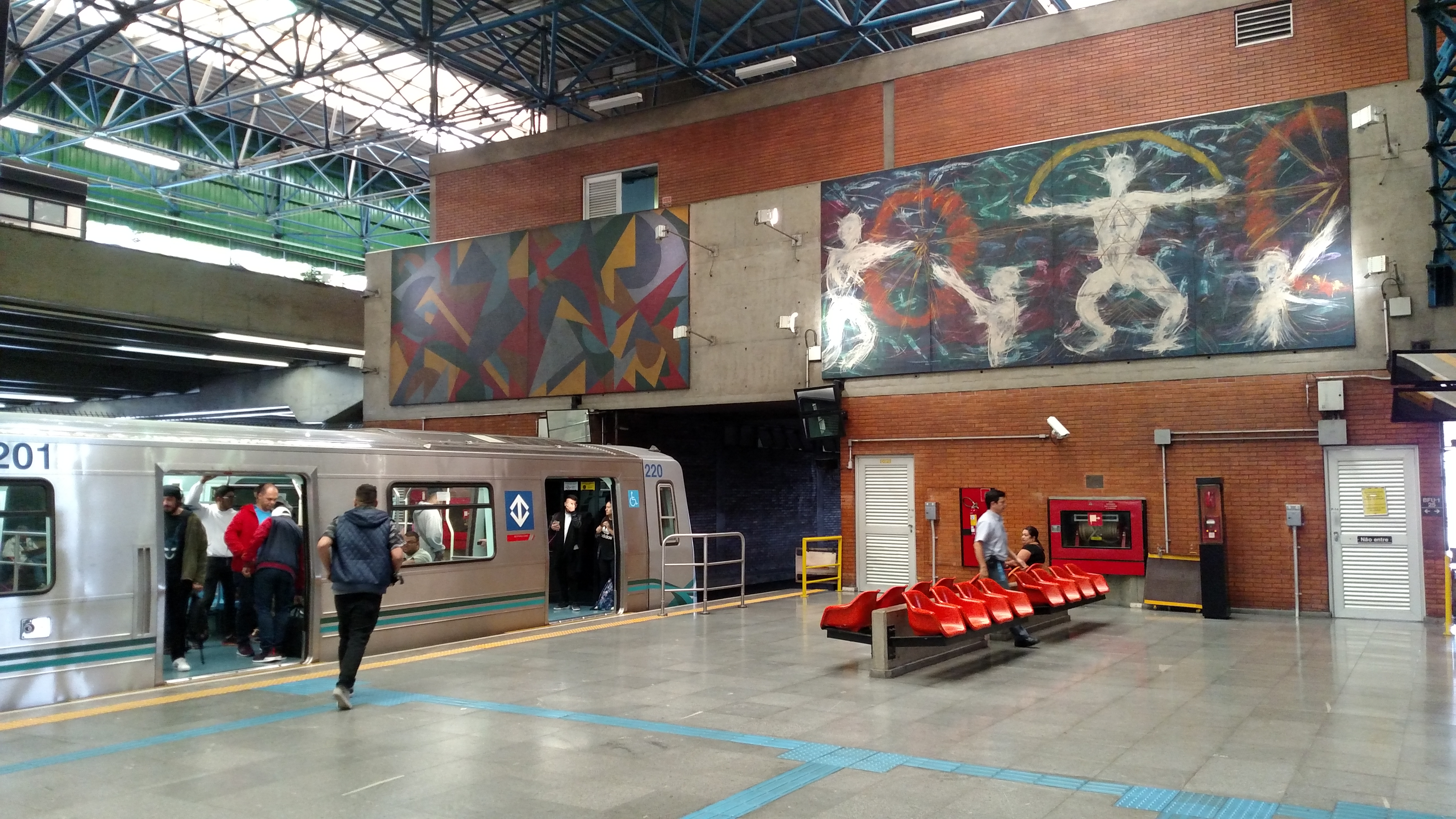 Os Senhores do Movimento José Roberto Aguilar (1990). Vista lateral da obra, exposta na estação Palmeiras/Barra Funda, em São Paulo (SP), Brasil.